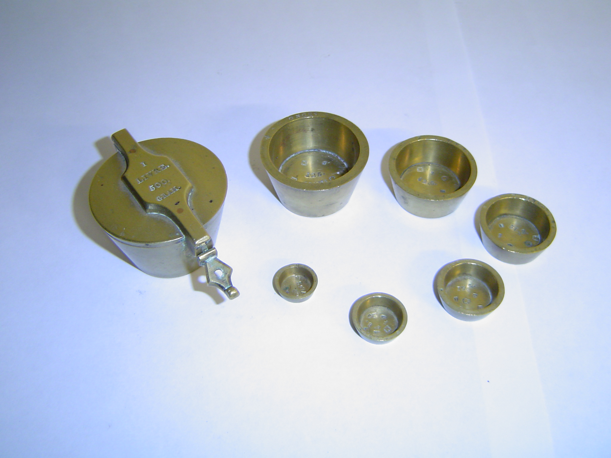 Photo personnelle de ma collection